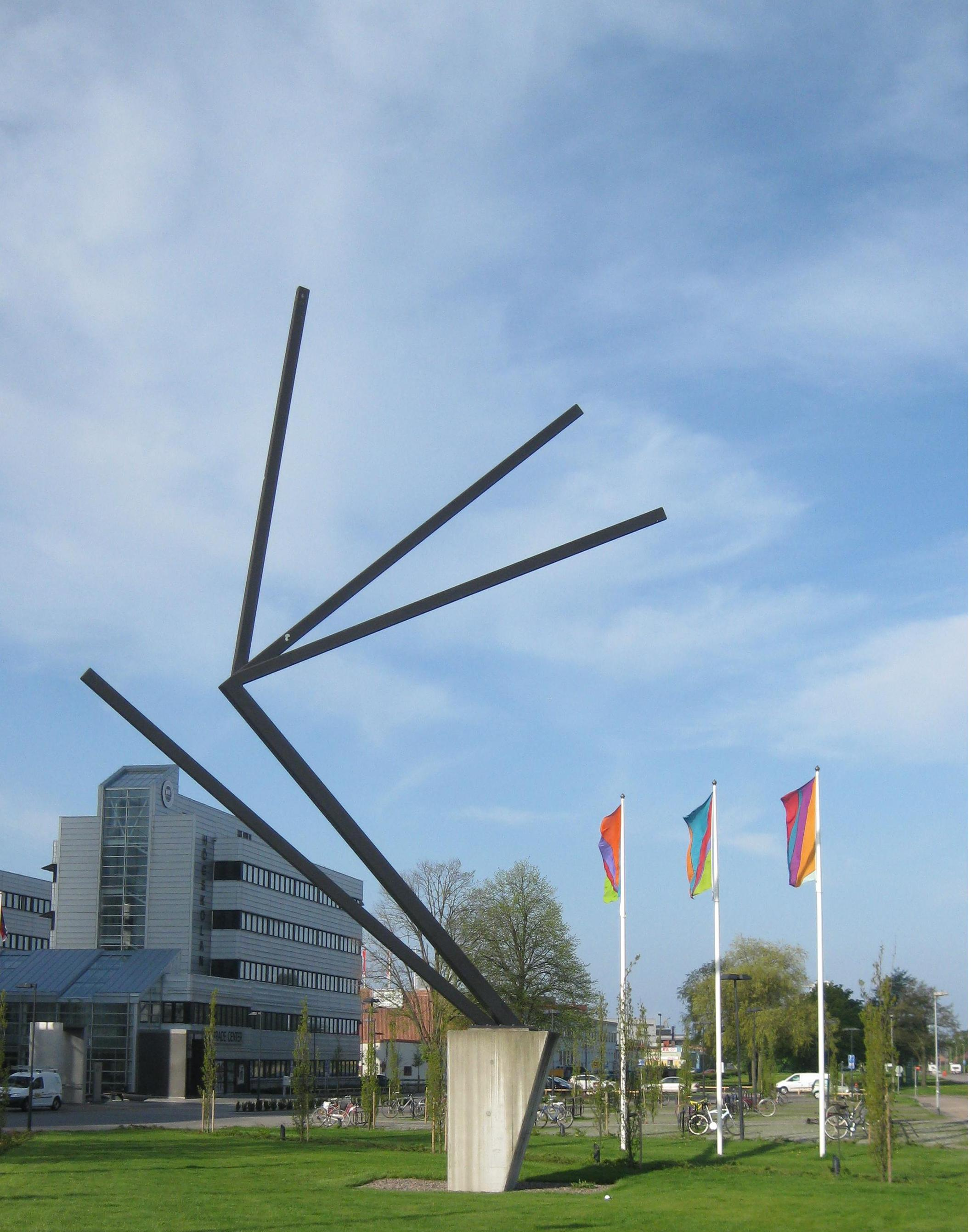 Skulpturen Asamk av Olle Bærtling vid Högskolan i Halmstad.